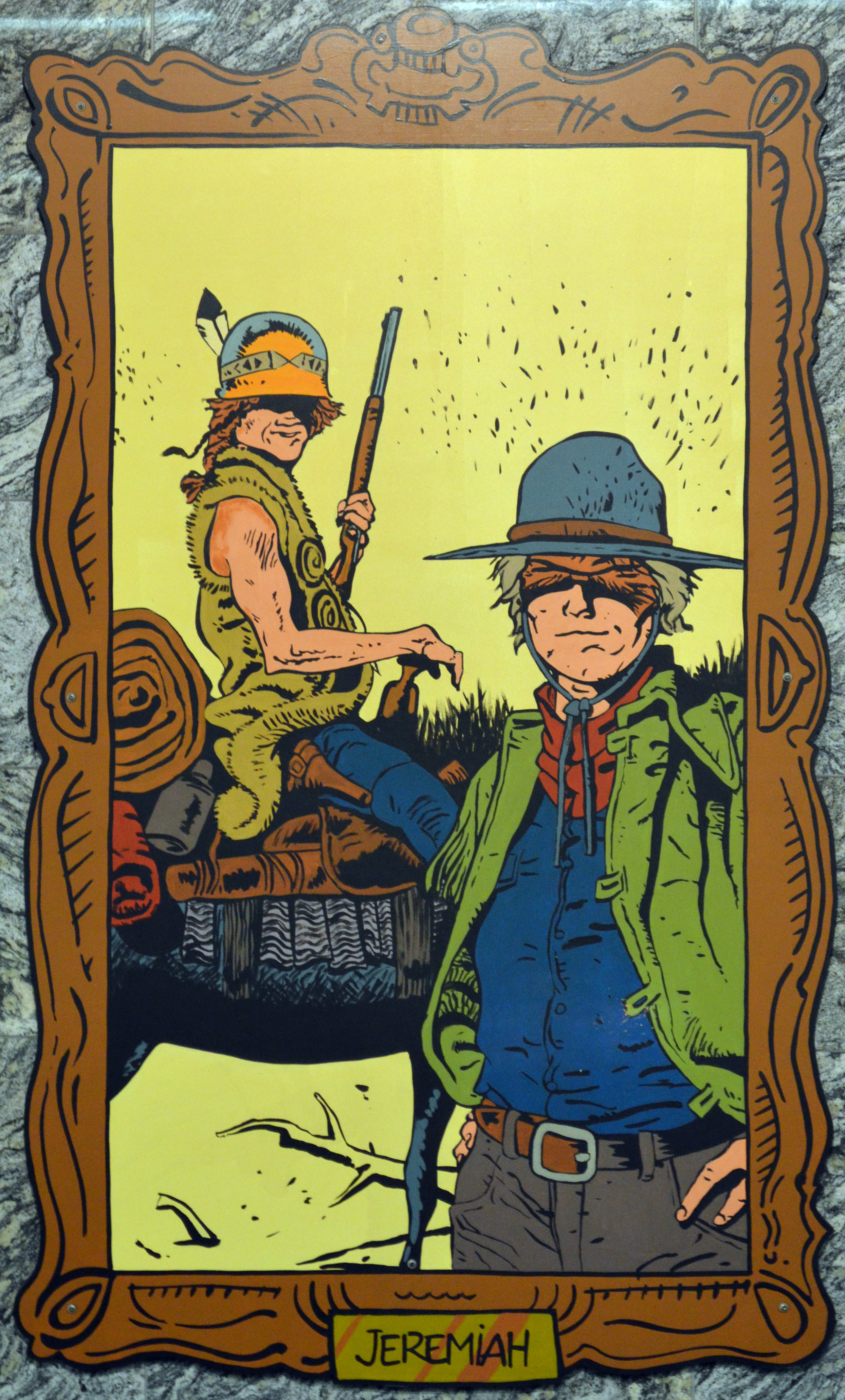 Charleroi (Belgique) - Station Janson du métro léger. Jeremiah.